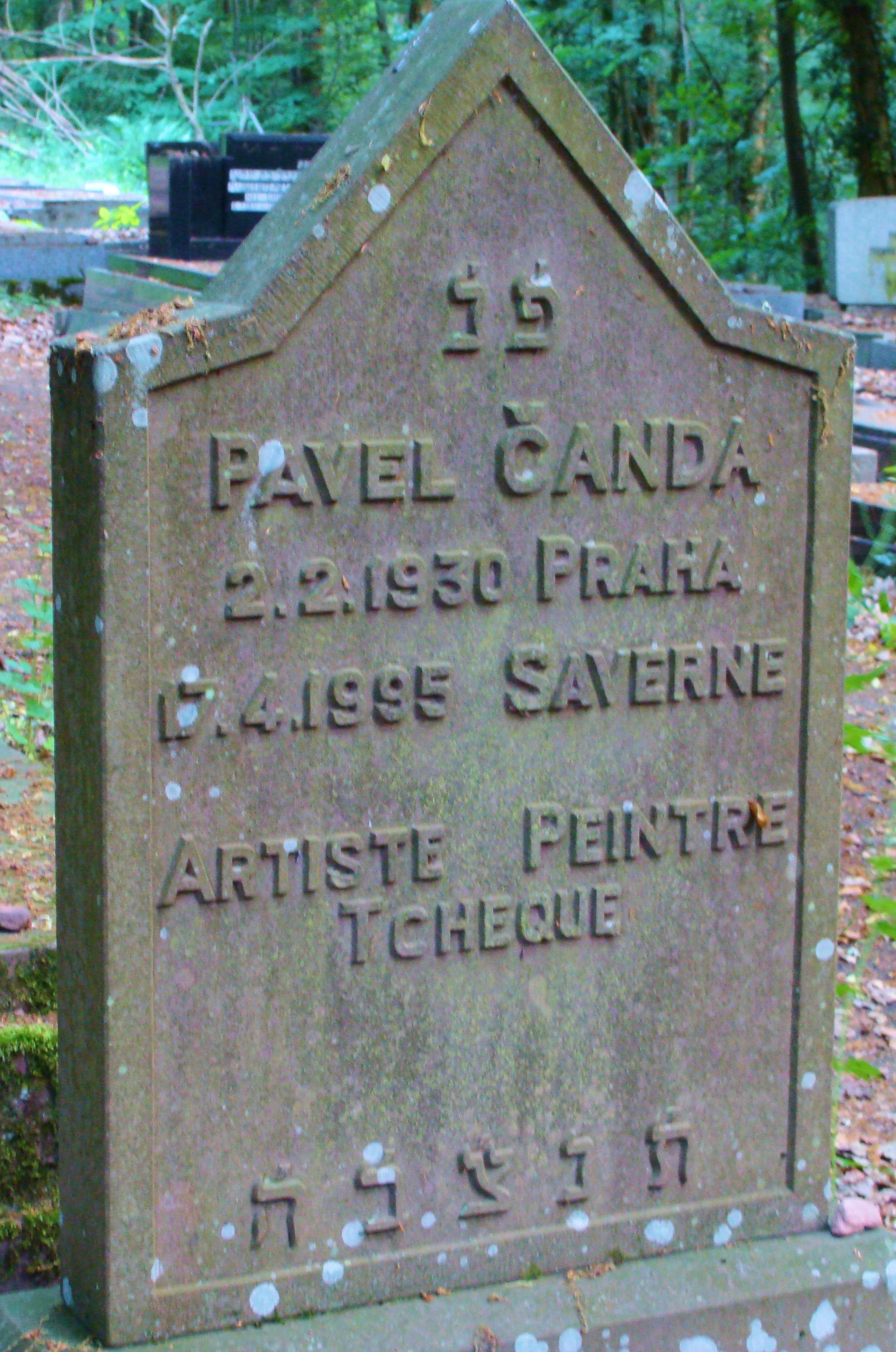 Tombe de Pavel Canda située dans le cimetière juif de Saverne (Bas-Rhin)